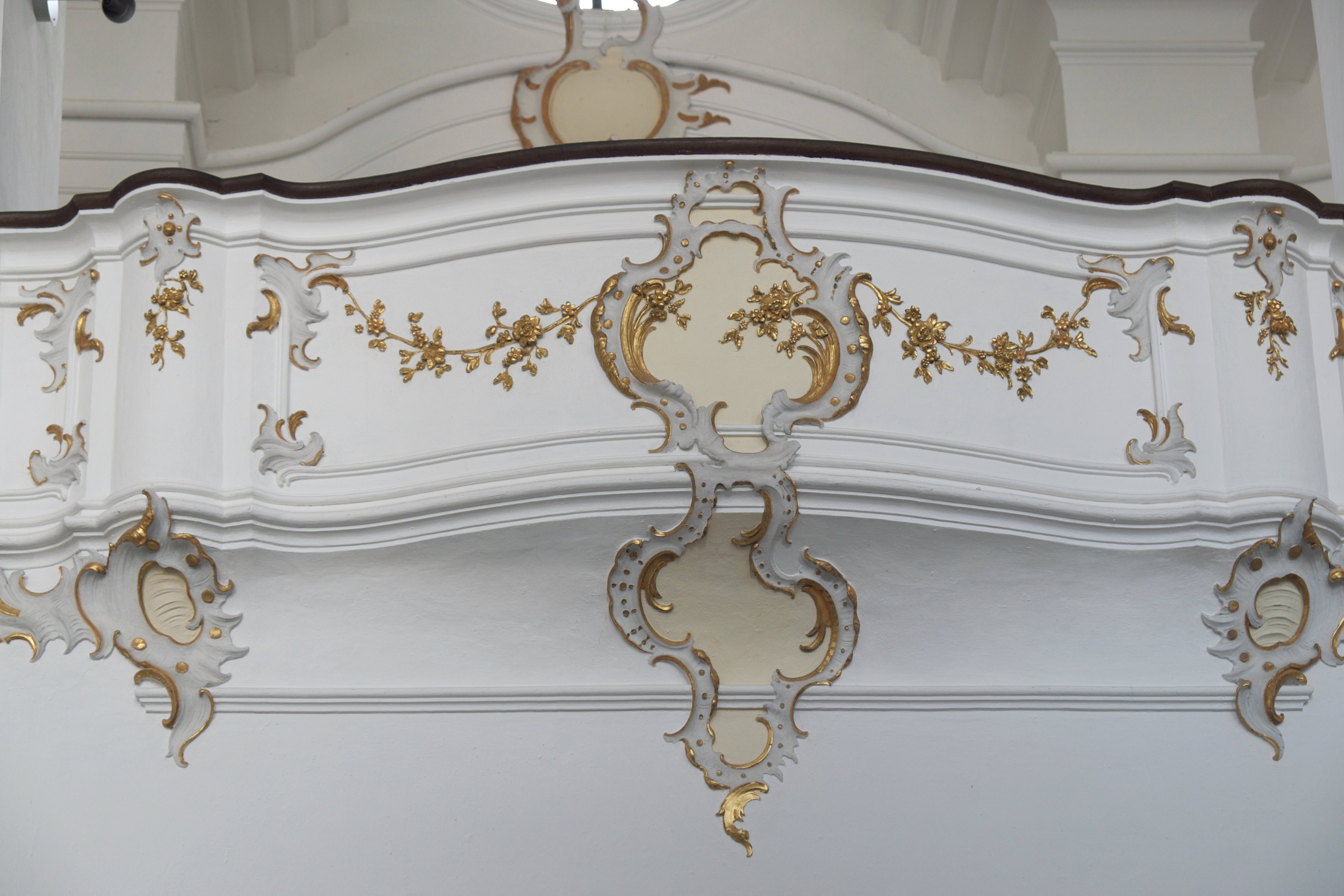 Wallfahrtskirche Heilig Kreuz, ehemalige Klosterkirche des Klosters Bergen in Bergen, einem Ortsteil von Neuburg an der Donau im Landkreis Neuburg-Schrobenhausen (Bayern), Oratorienloge im Chor mit Rocaille-Stuck